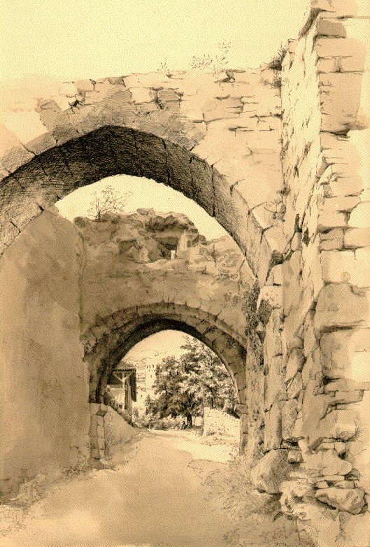 Torbogen im Südtor der Burg Rötteln - kolorierte Federzeichnung v. August Heckmann